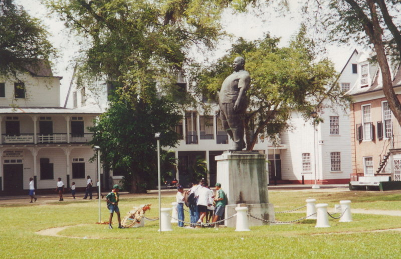 Statue Johan Adolf Pengel in Paramaribo, Suriname